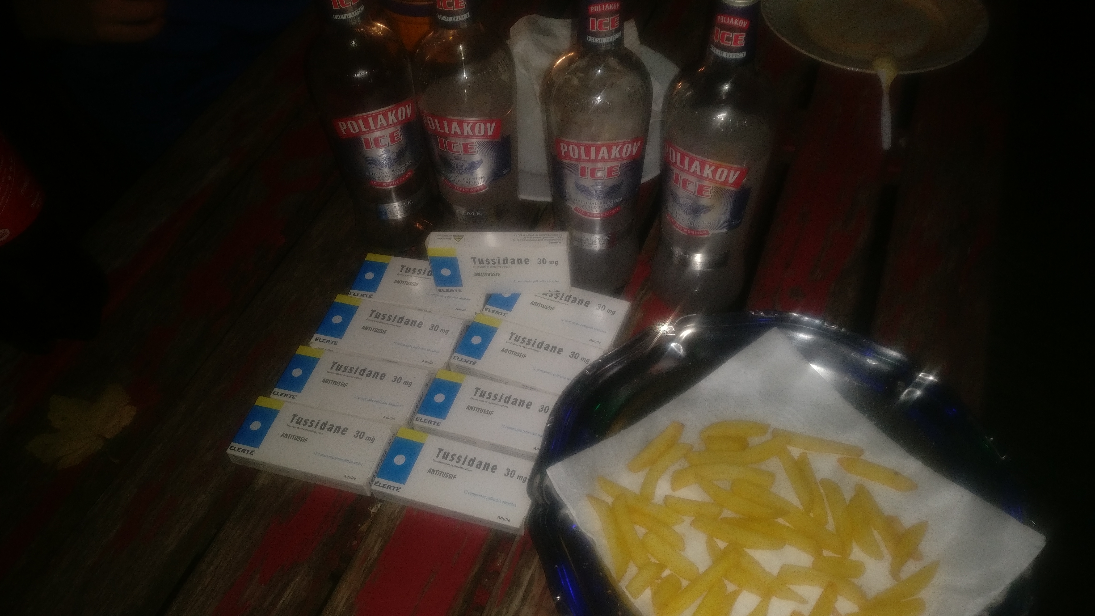 Neuf boites de Tussidane contenant chacune 12 comprimés dosés à 30mg de dextrométhorphane.